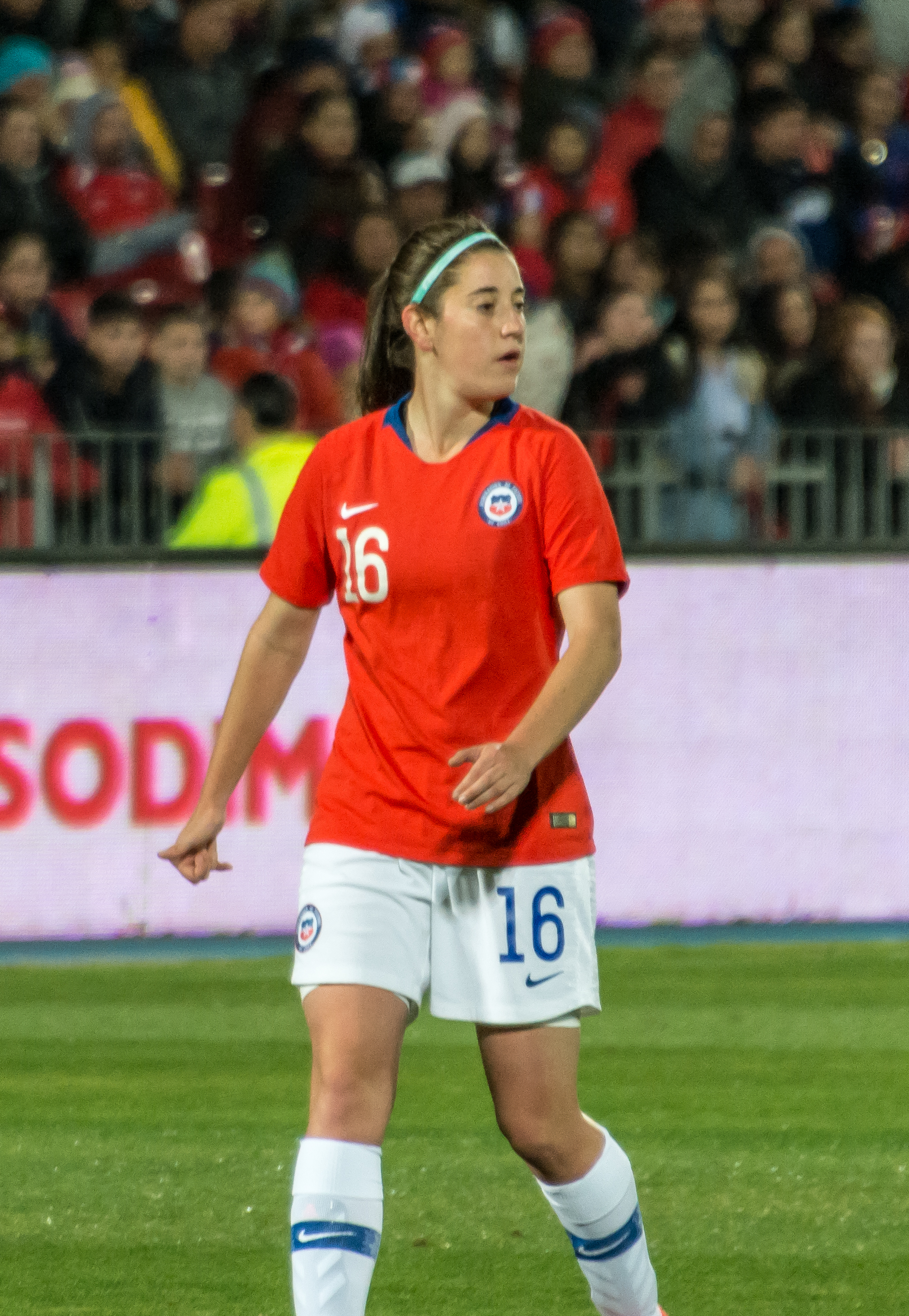 Rosario Balmaceda, Chile v Colombia, Estadio Nacional, Ñuñoa, Santiago, Chile.